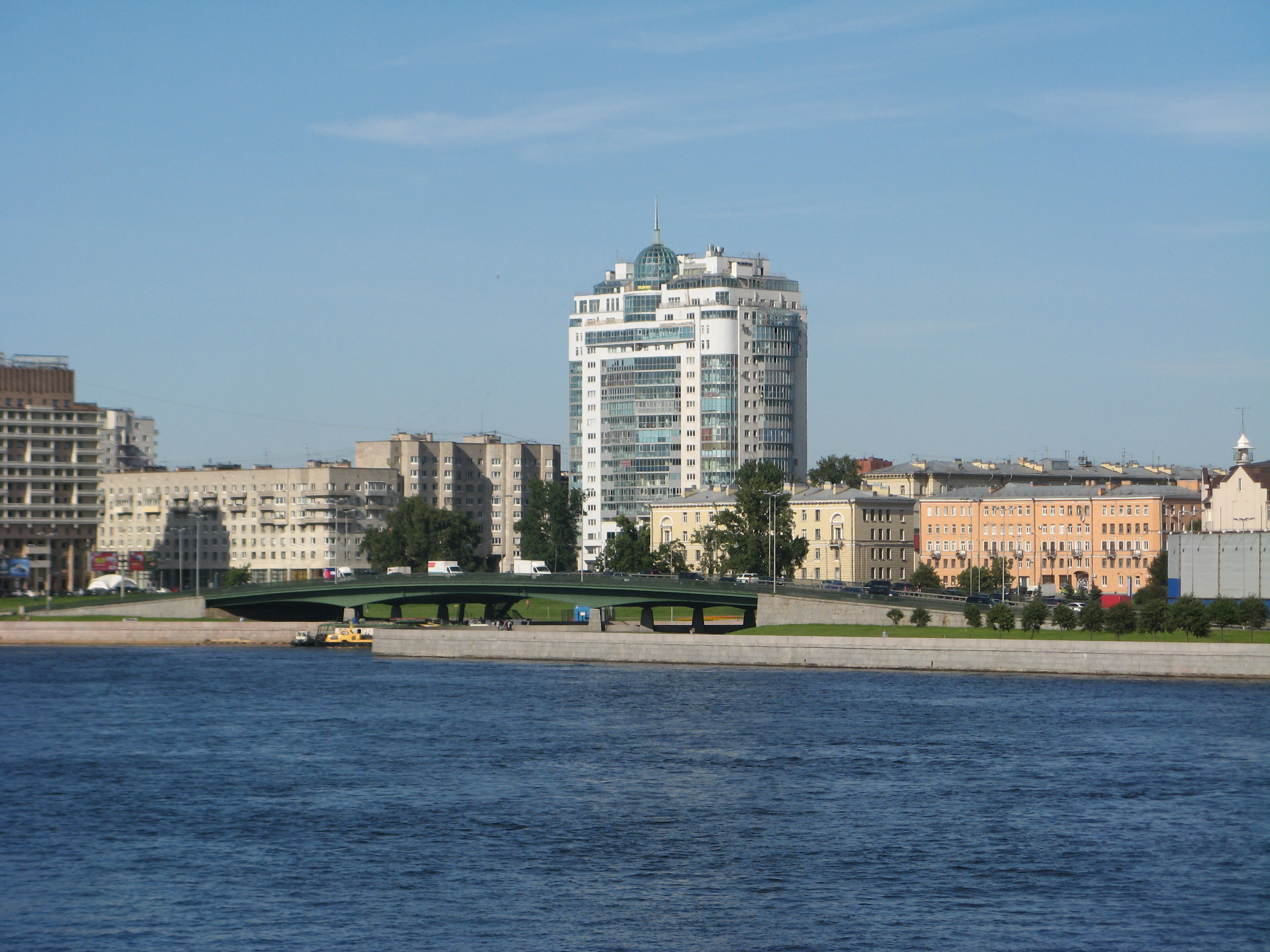 Малоохтинский мост в Санкт-Петербурге